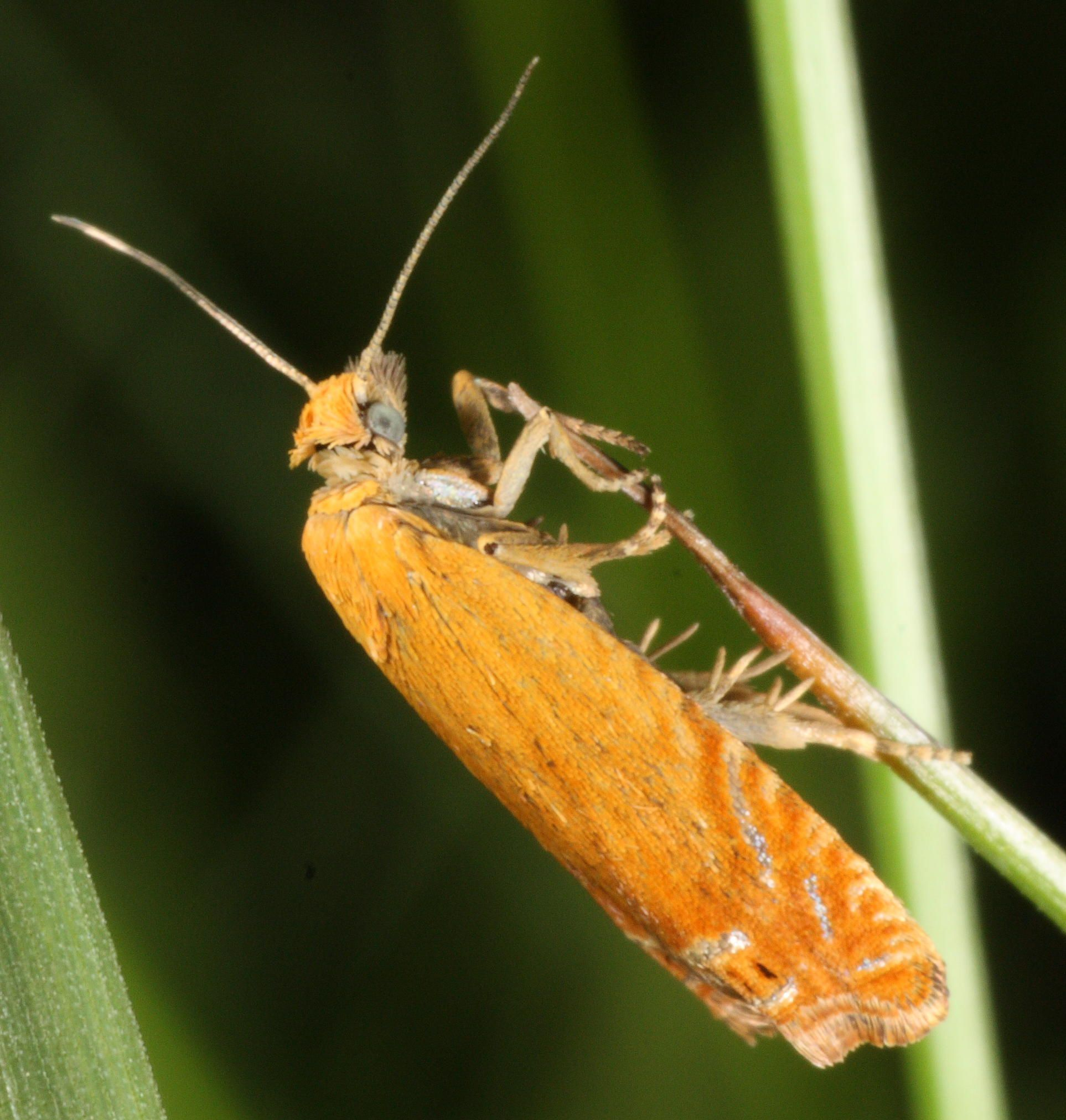 Perikumvikler Lathronympha striganaTemplate:Byline